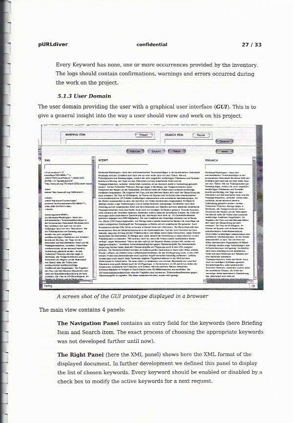 Auszug aus Programmdokumentation